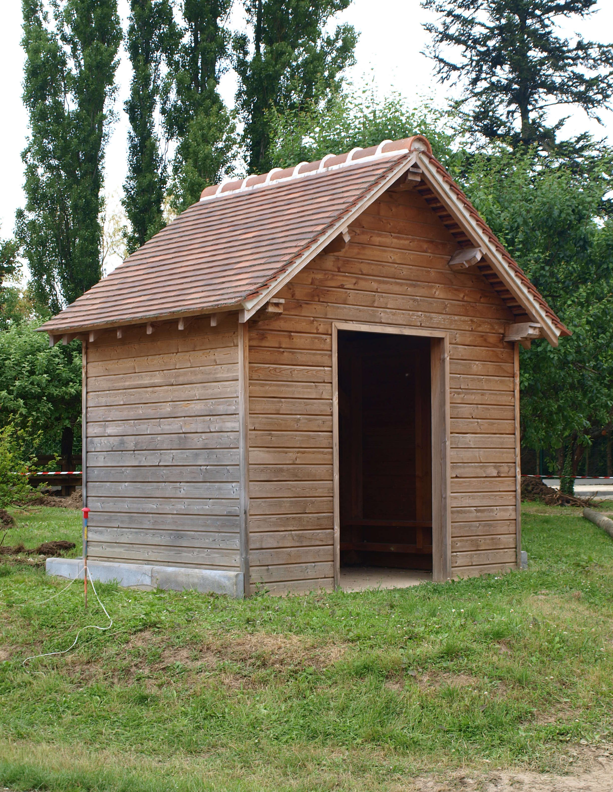 Sommecaise (Yonne, France) - abribus.